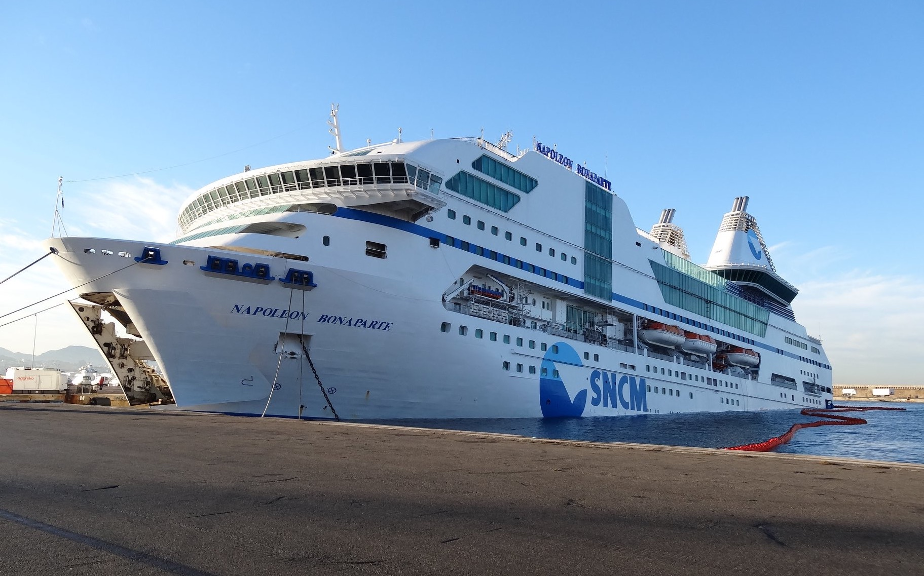 Le Napoléon Bonaparte de la SNCM coulé dans le port de Marseille après avoir violemment heurté le quai.